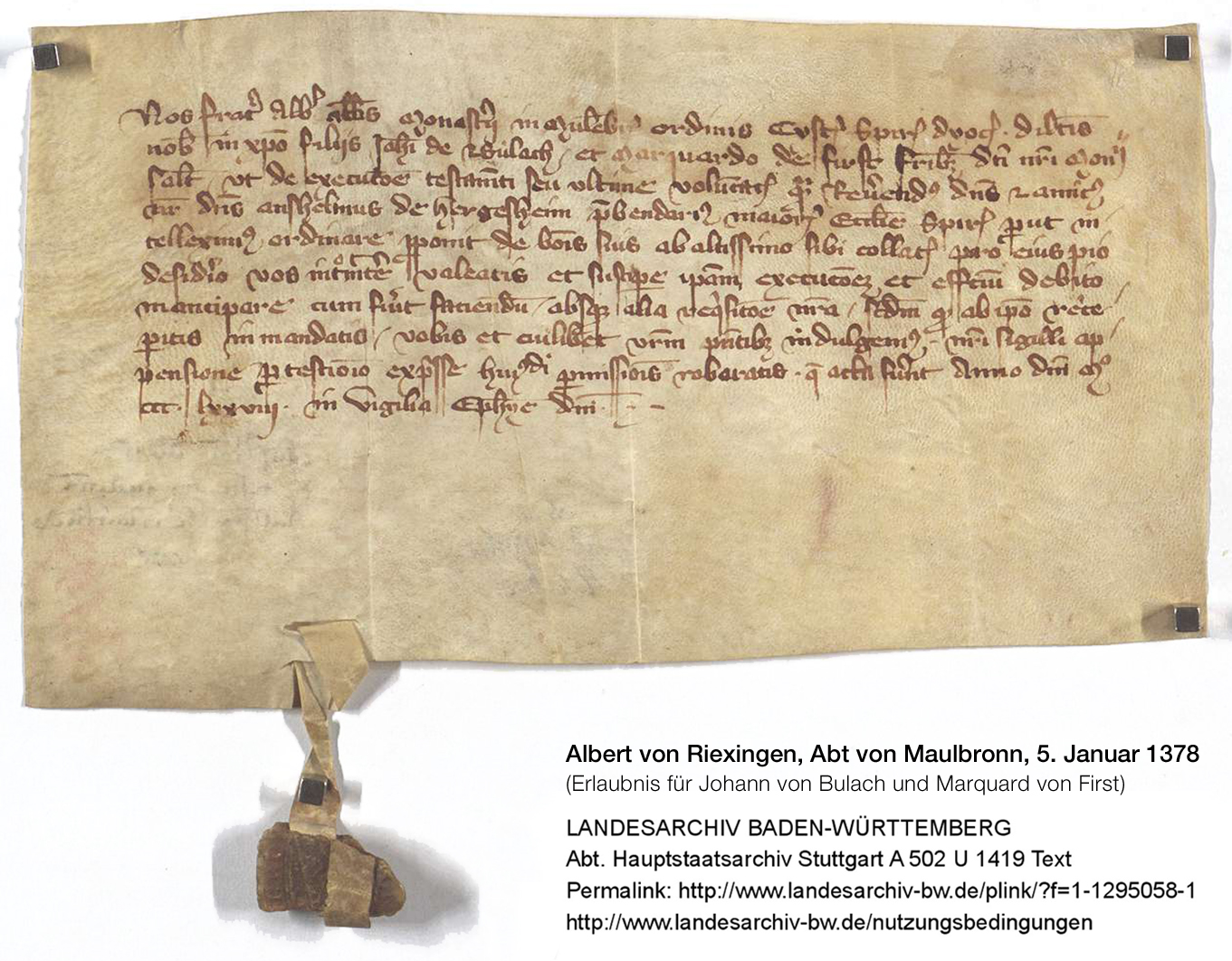 Abt Albert von Maulbronn erlaubt den Konventualen Johann von Bulach und Marquard von First, des letzten Willens Disposition von Anselm von Herxheim (Hergesheim), Pfründners der Domkirche in Speyer, beizuwohnen und sie zu vollziehen.